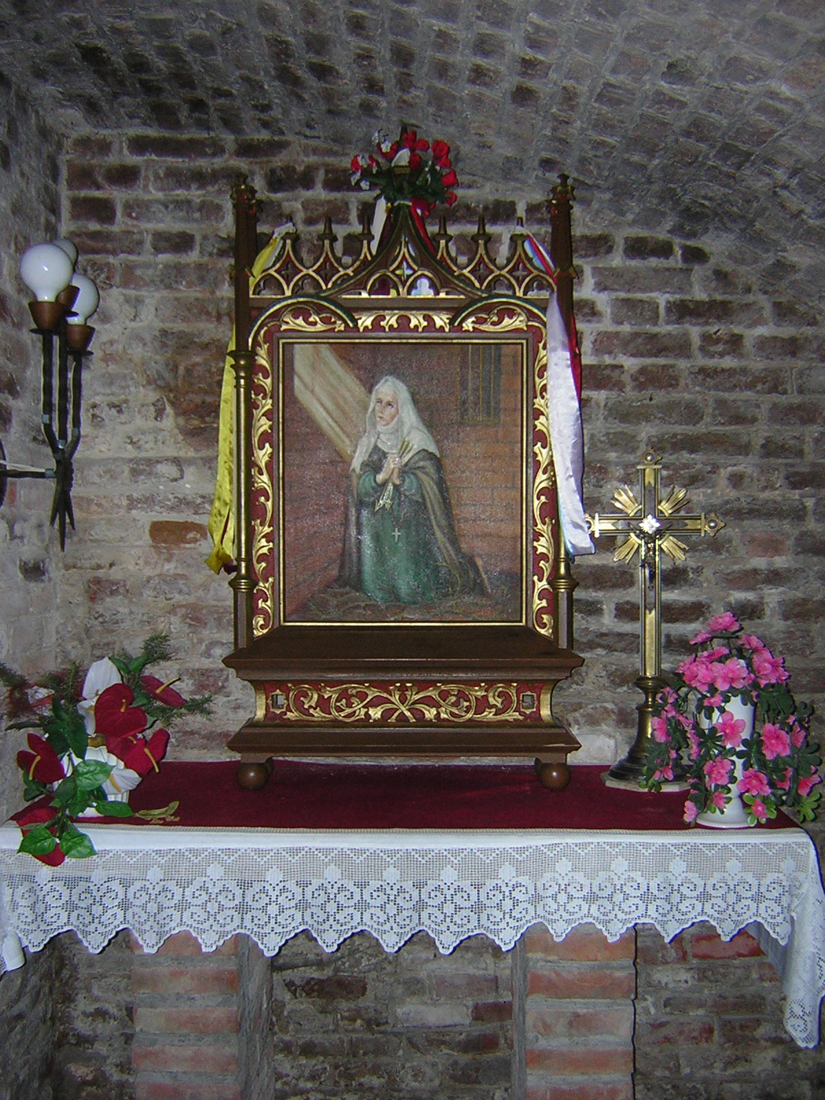 Ołtarz w celi bł. Doroty z Mątowów w katedrze w Kwidzynie